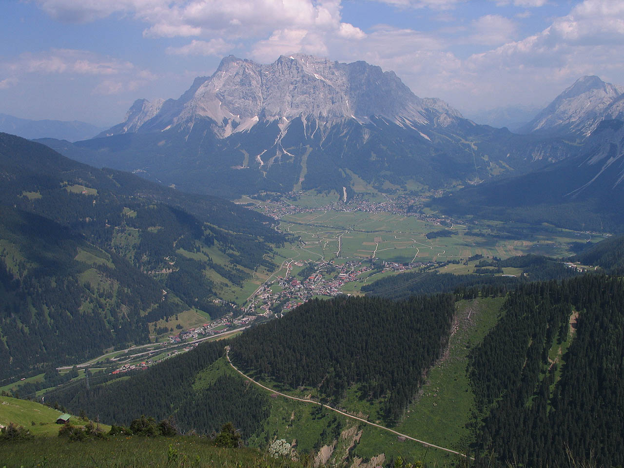 Zugspitze über dem Ehrwalder Becken